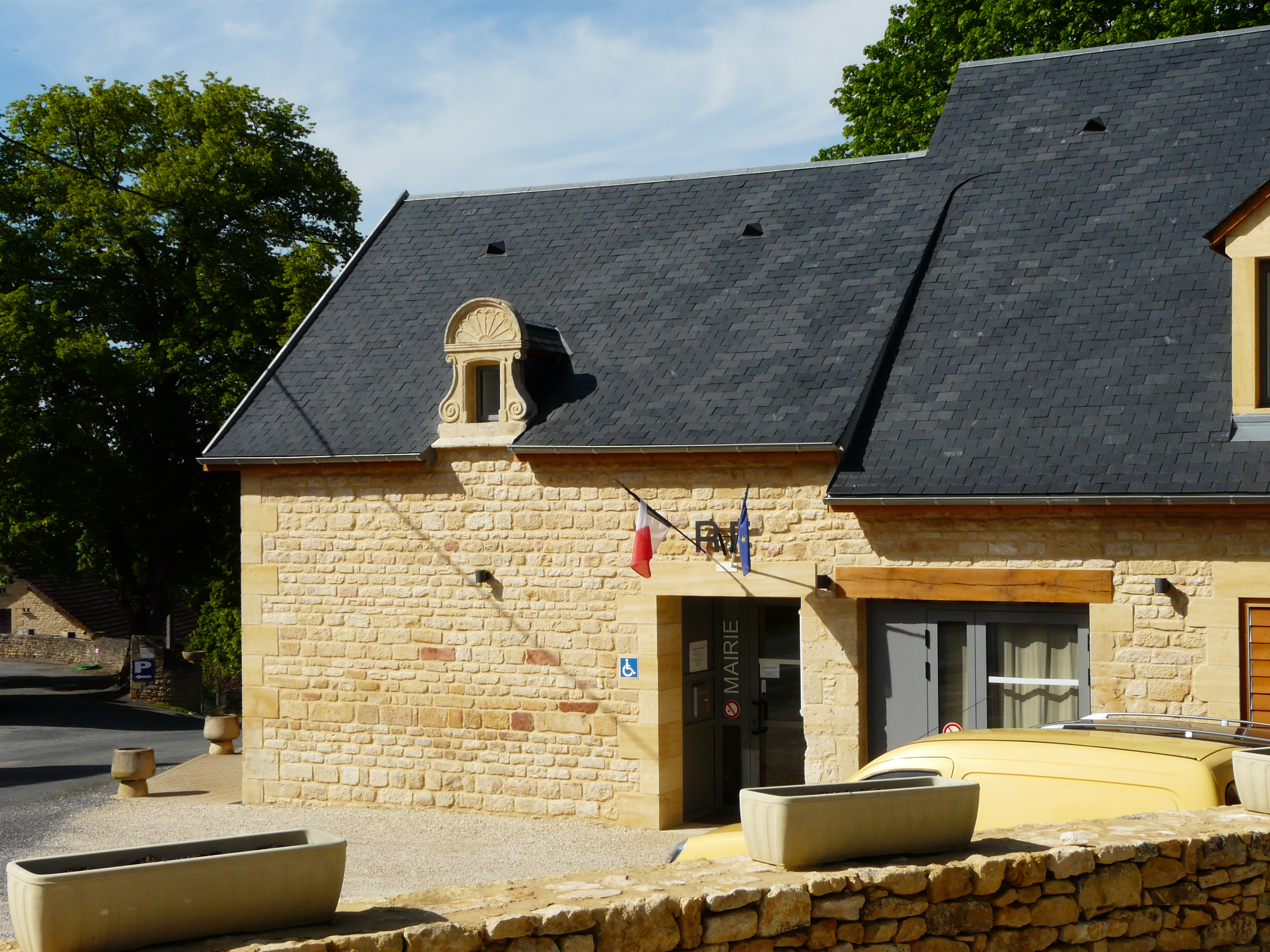 La mairie de Marcillac-Saint-Quentin, Dordogne, France.